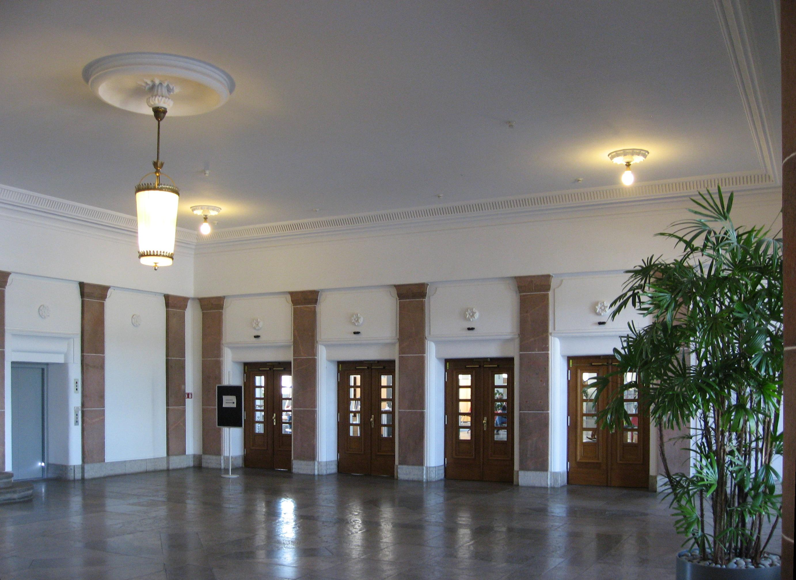 Leipzig, AOK-Gebäude, Foyer, erbaut 1922–1925 von Otto Droge